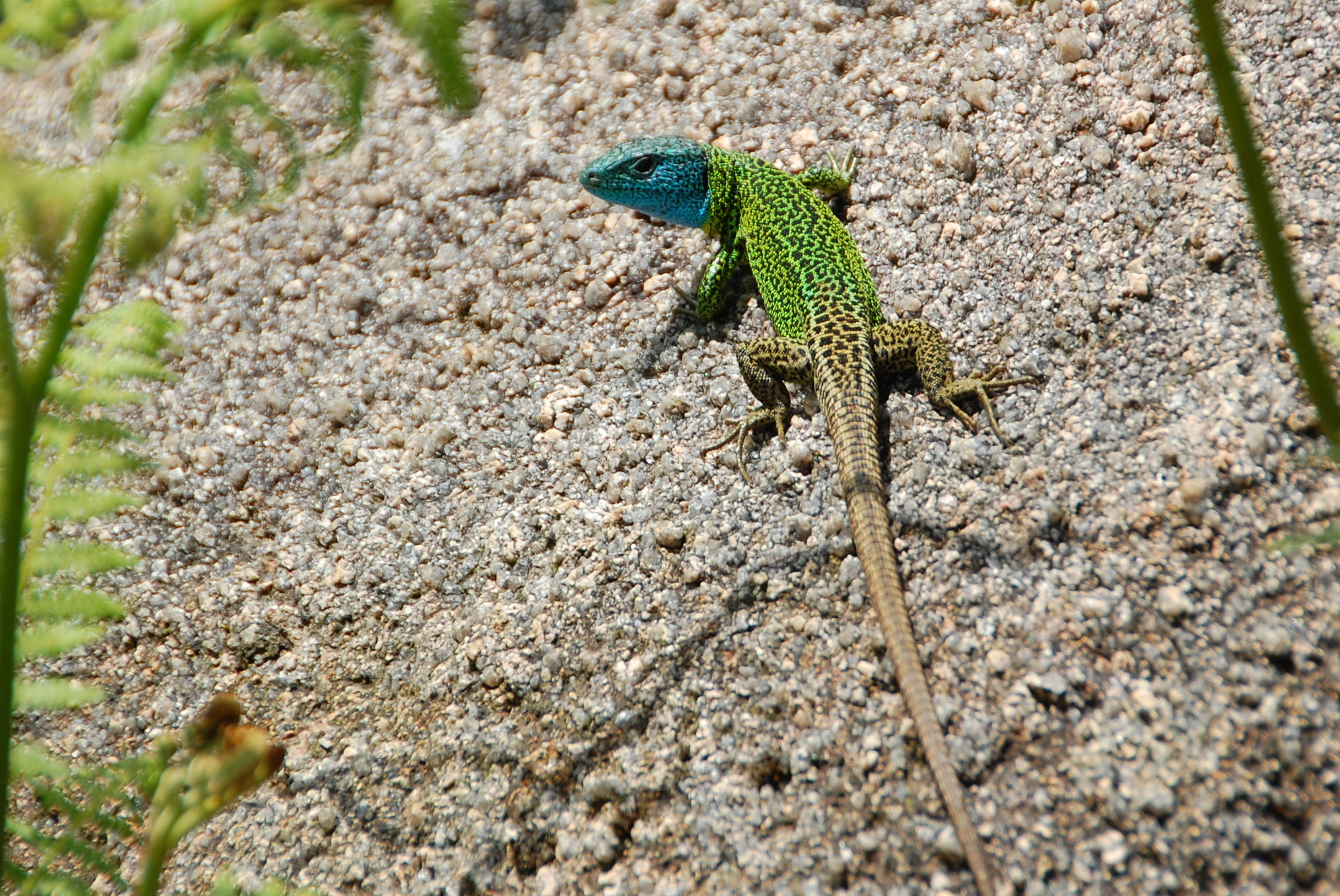 Lacerta schreiberi (Lacertidae). Monte Pindo, A Coruña, España.